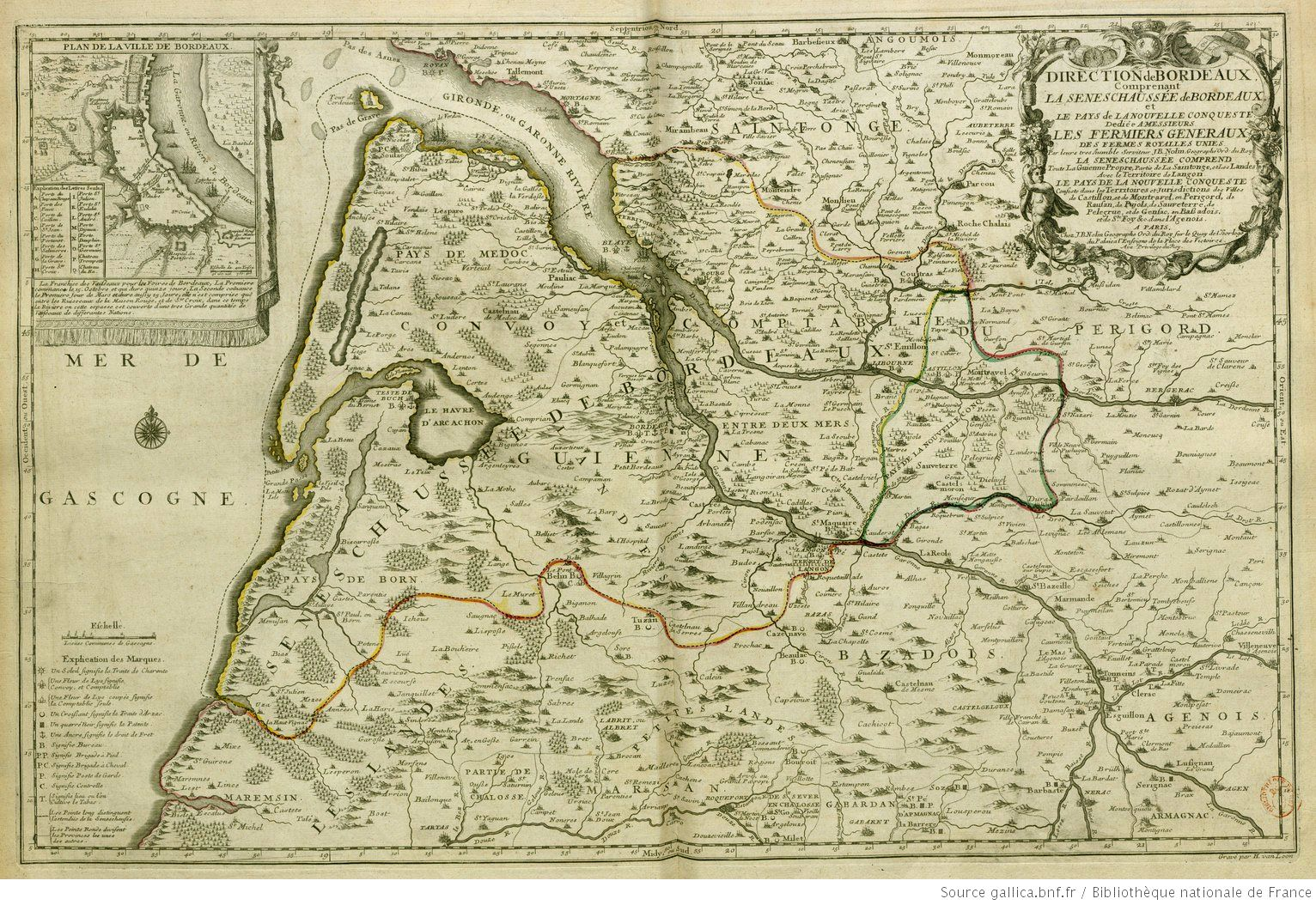 La Séneschaussée de Bordeaux et Le Pays de La Nouvelle Conqueste Dédiée A Messieurs Les Fermiers Généraux des Fermes Royalles Unies / Par J.B. Nolin (1657?-1708) ; Gravé par H. Van Loon. 1700.